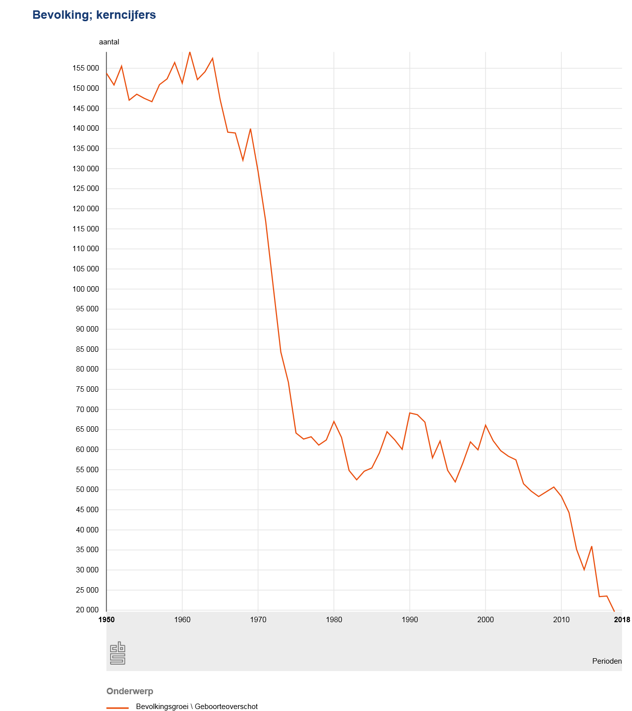 Geboorteoverschot vanaf 1950